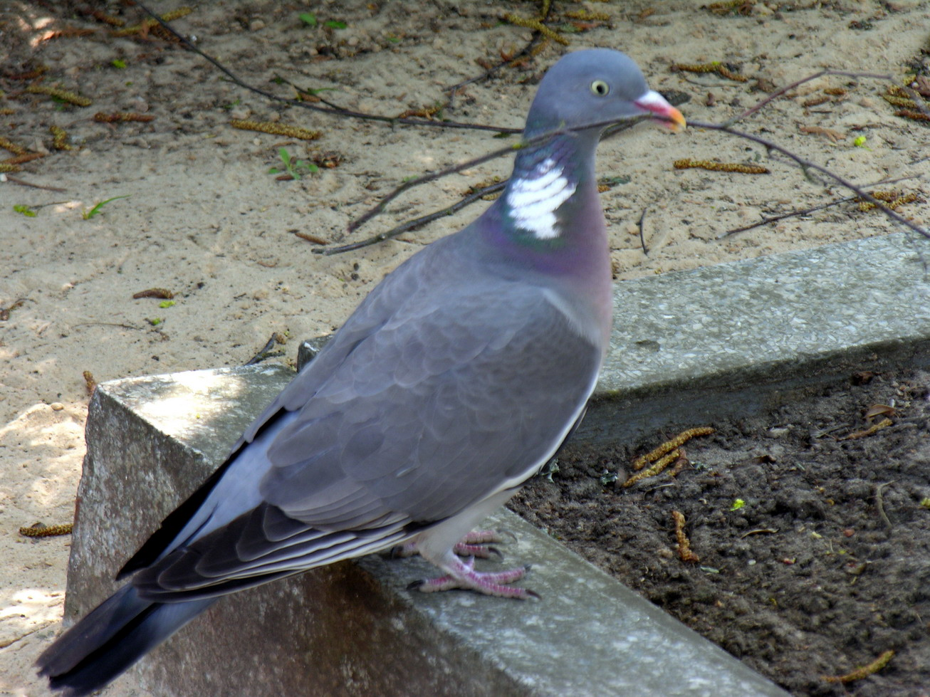 Columba palumbus